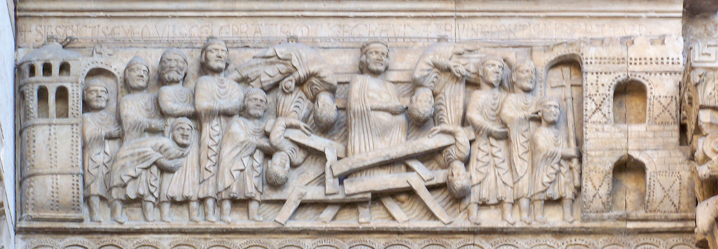 Duomo di Fidenza (provincia di Parma, Italy): bassorilievo con il miracolo della donna gravida situato a destra del portale centrale della cattedrale. XII secolo.